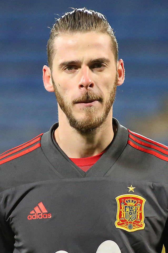 Испания в отличном настроении готовится к матчу с Россией